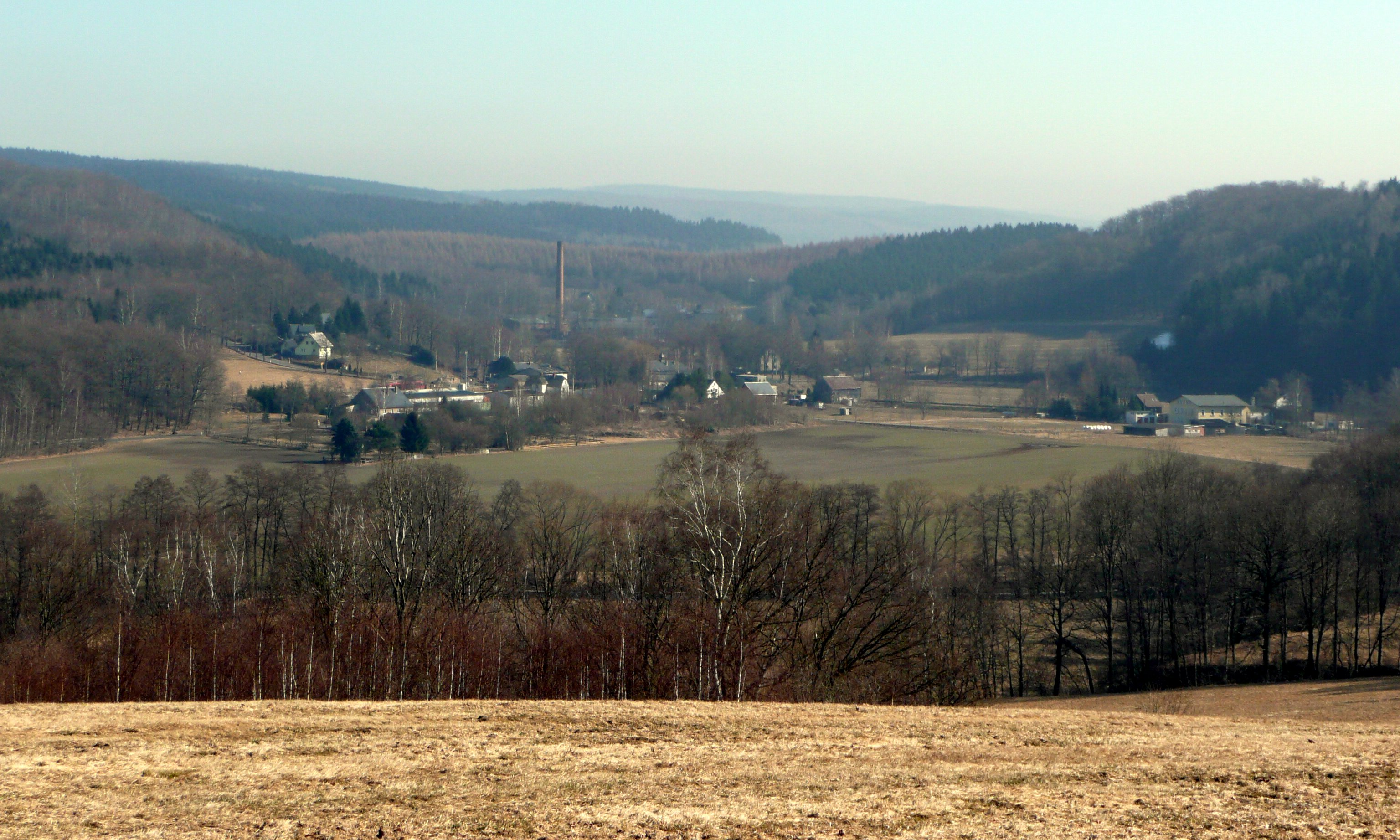 Blick auf den Pockauer Ortsteil Nennigmühle im Flöhatal im Erzgebirge - Blick von der Verbindungsstraße Pockau-Sorgau